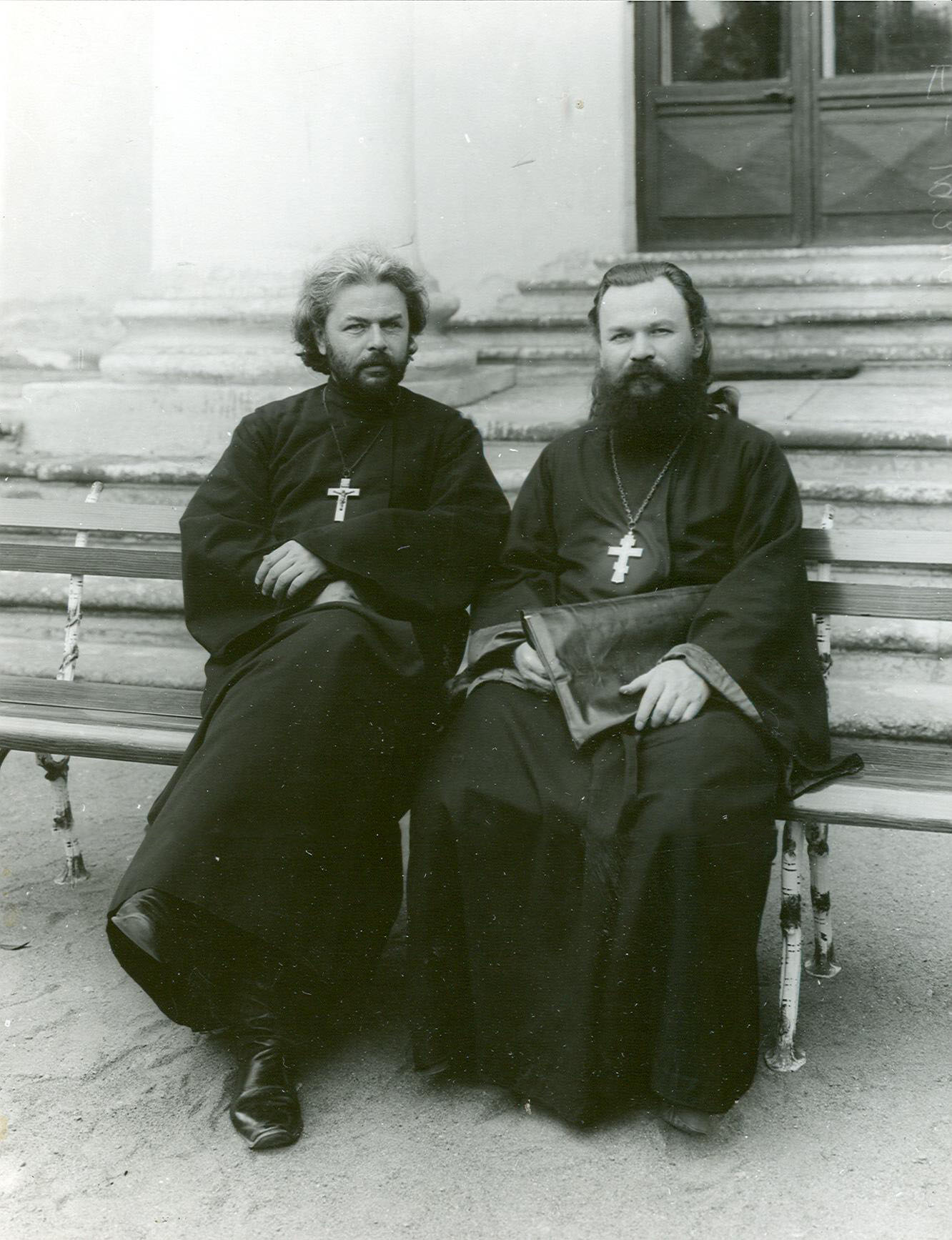 Депутаты Второй Государственной Думы о. Григорий Петров и о. Константин Колокольников.